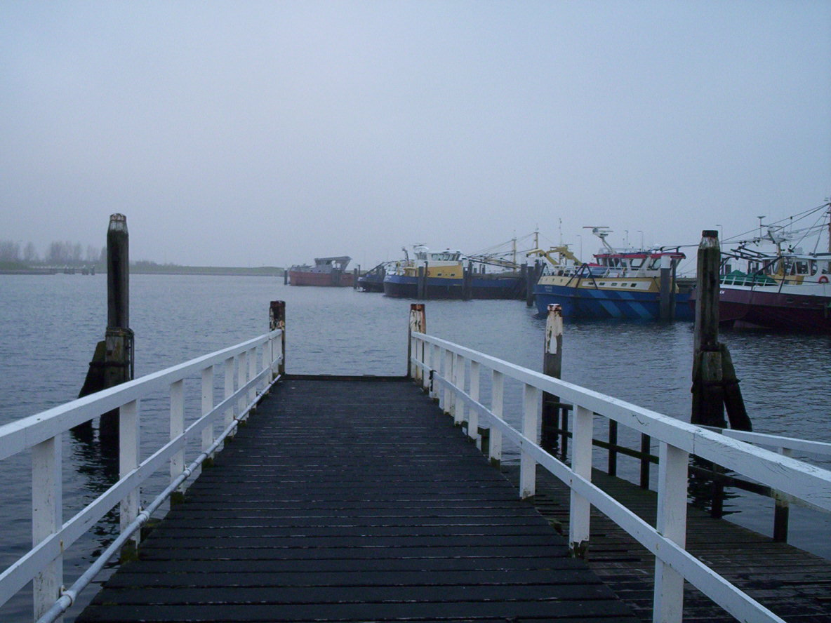 Op de foto is de haven van Bruinisse te zien vanaf de kant. Er zijn enkele meerpalen te zien, en rechts liggen enkele kotters